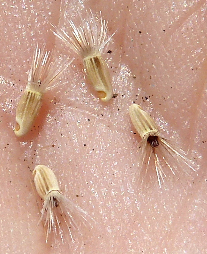 Centaurea melitensis (Abrepuños, cardo escarolado, ...) - cipselas sueltas con eleosoma - circa Estación de Contenedores de FFCC Abroñigal/Embajadores, Madrid (España).